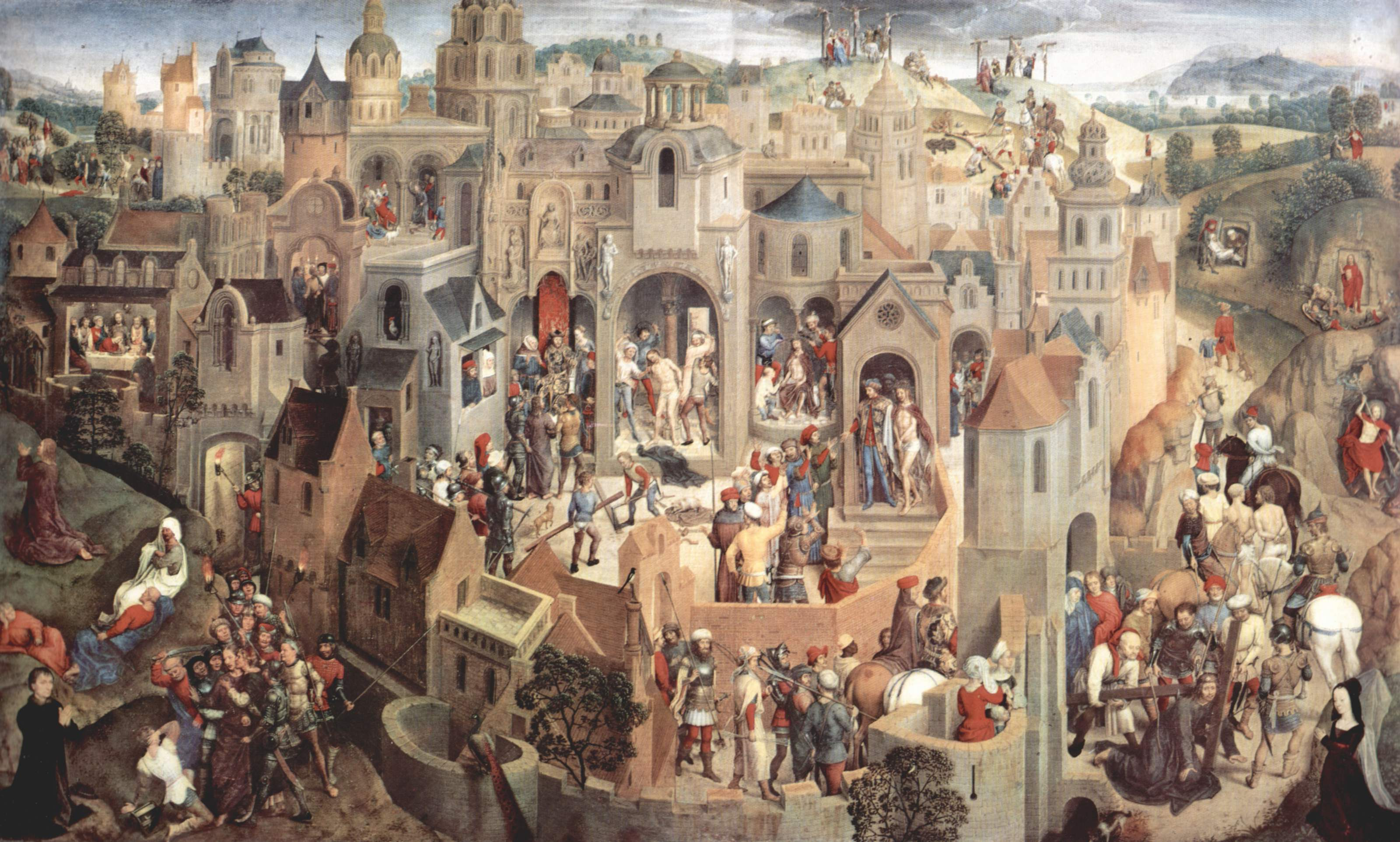 Tafel mit Szenen der Passion Christi